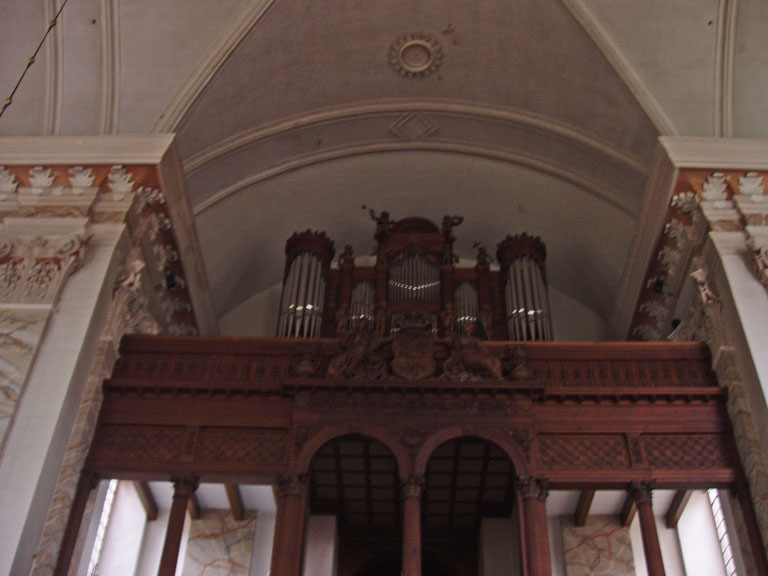 Orgel der Schelfkirche St. Nikolai, Schwerin (Germany), Schelfstadt